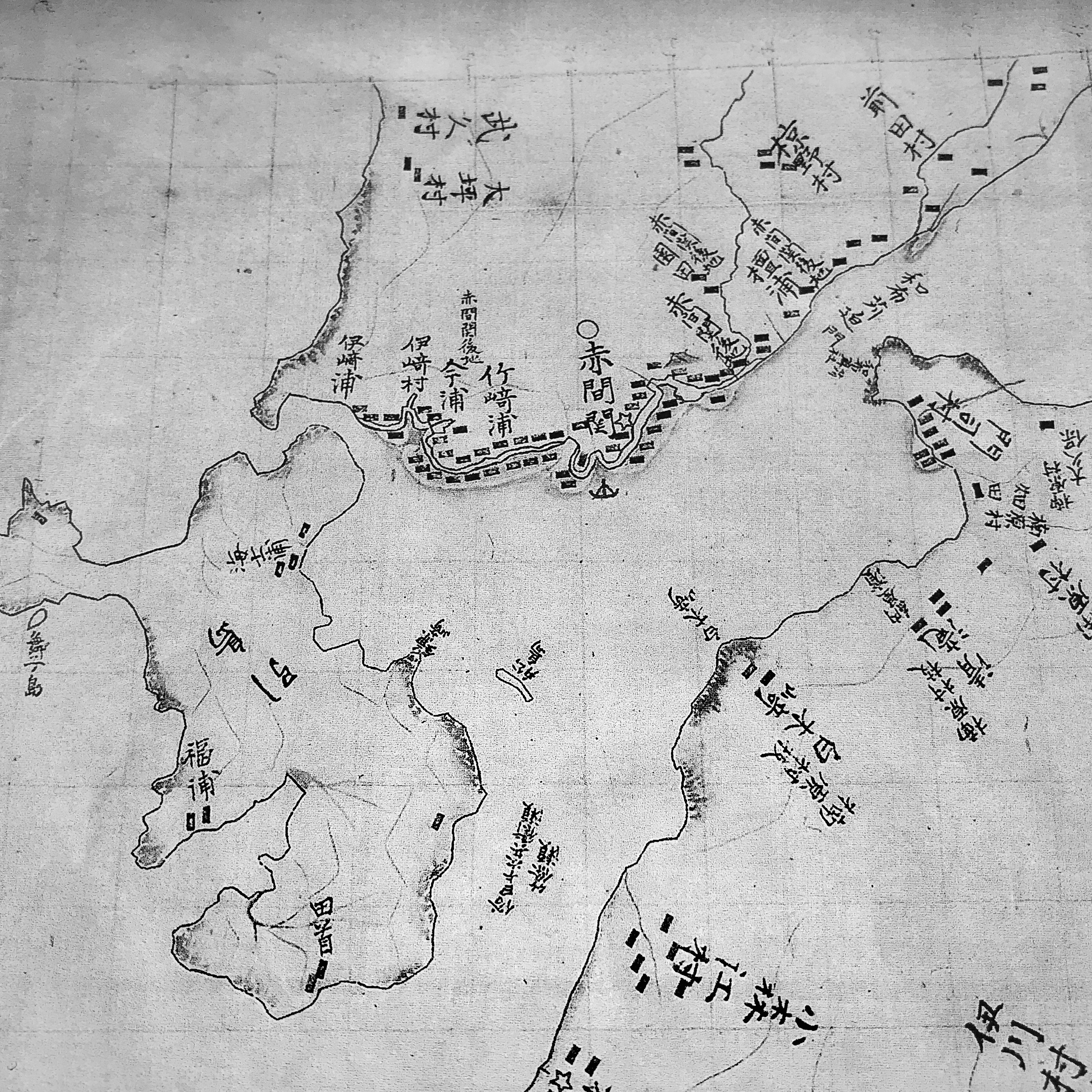 伊能図の巌流島近辺の抜粋